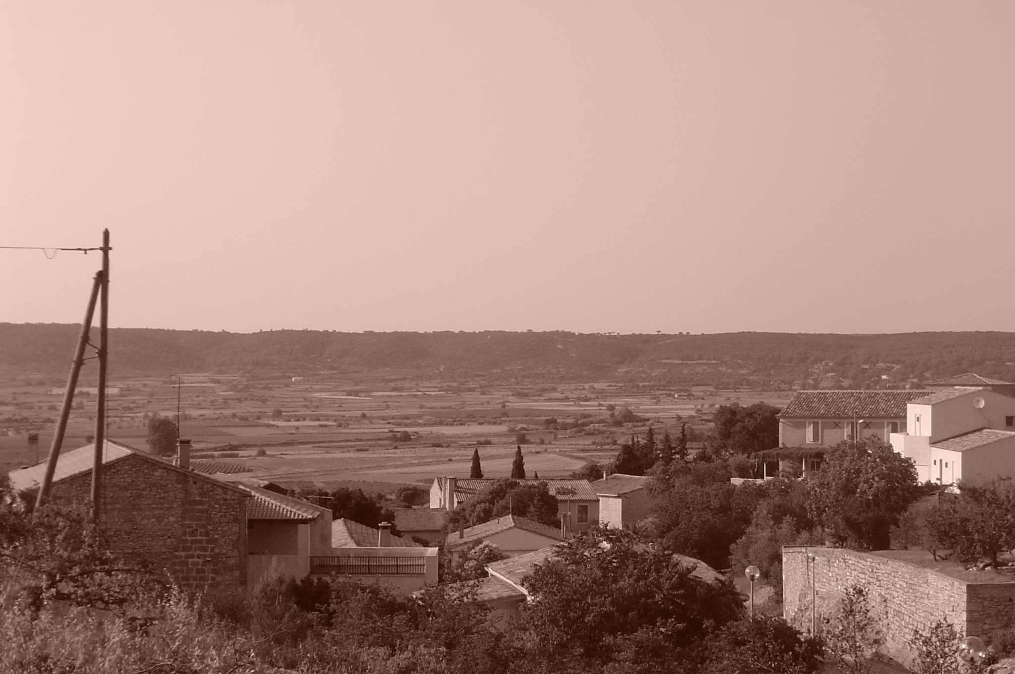 Centre du village de Langlade, photo personnelle de Nicolas Cadène, 14/10/2006, reproduction à l'identique autorisée sur Wikipedia